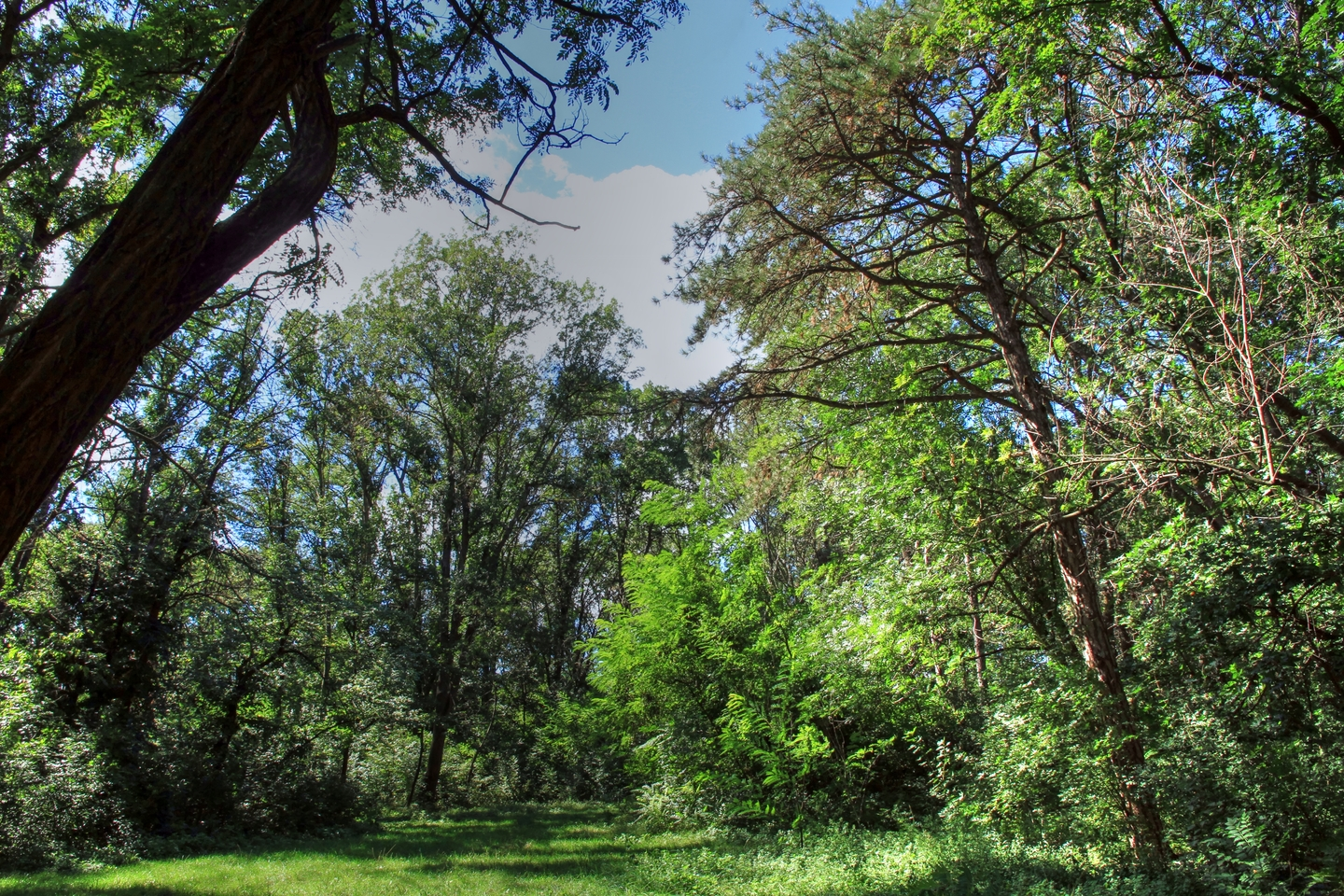 Столниченский парк, монумент природы, находится в Единецкий район, с. Столничень (код MD-ED-map-015)